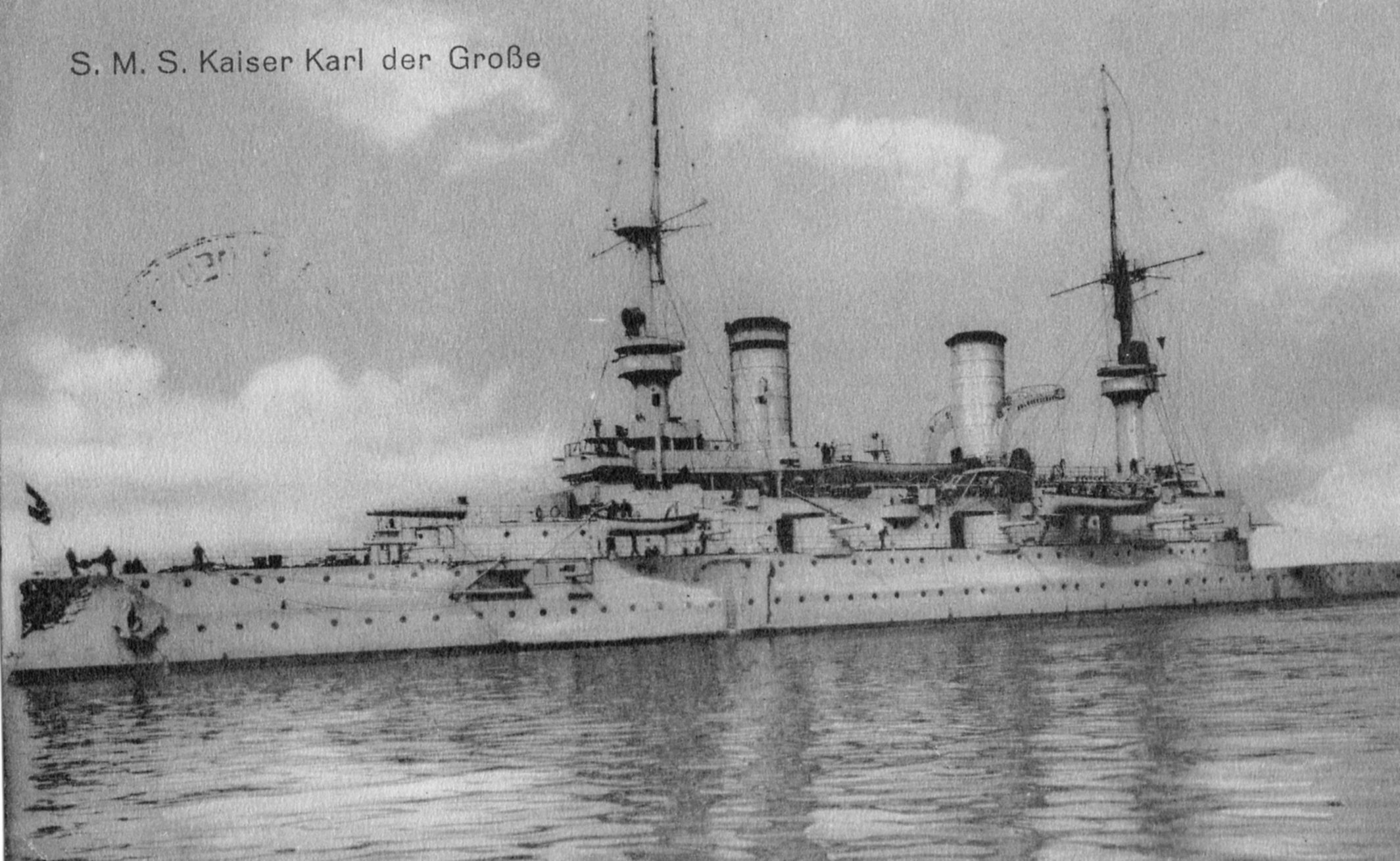 Linienschiff SMS KAISER KARL DER GROSSE. Feldpostkarte von Georg Cording, Vorpostendampfer VORWÄRTS, Wilhelmshaven vom 15. Dezember 1915 an Mariechen Westerholt, Osternburg im Großherzogtum Oldenburg